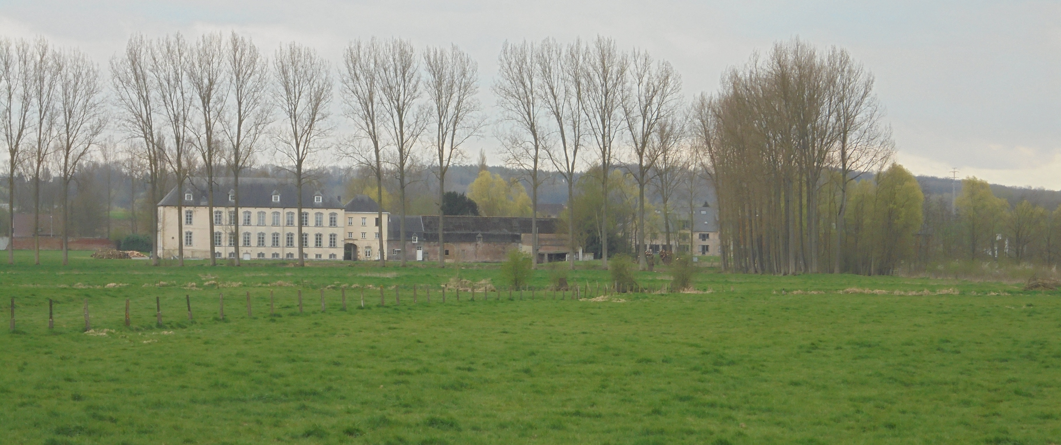 Abdij Beaupré - Klakvijverstraat - Grimminge - Geraardsbergen - Oost-Vlaanderen - België